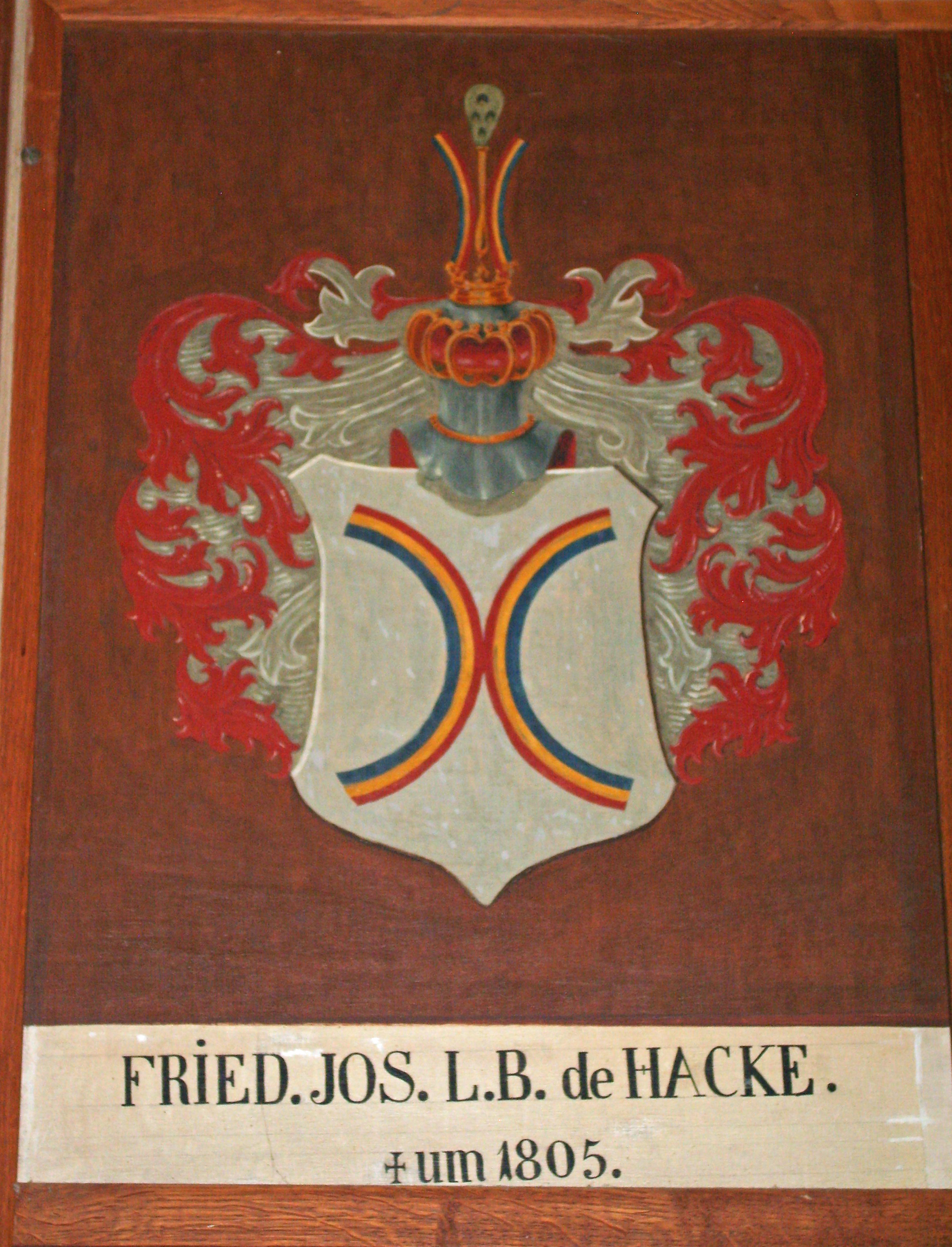 Konstanzer Münster Wappen im Kreuzgang Hacke